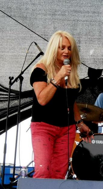 Bonnie Tyler Budapesten, Budavári Palota